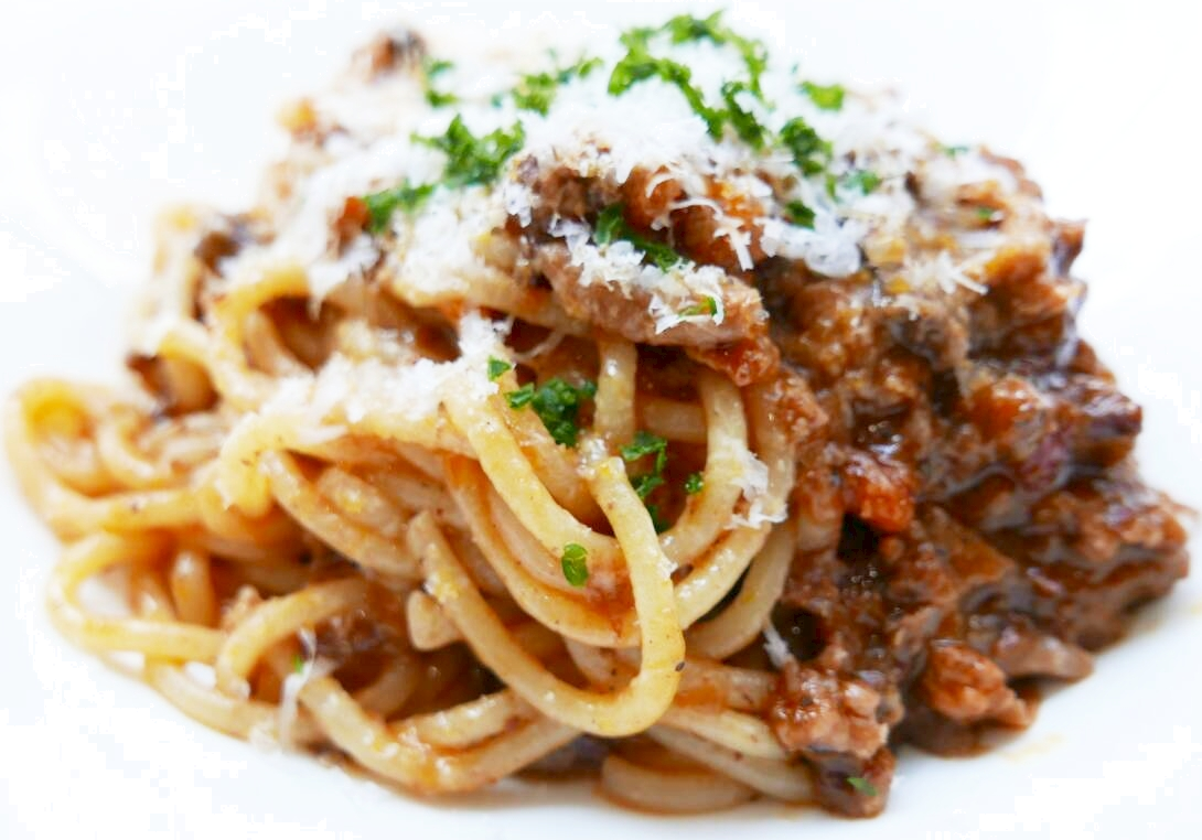 肉や野菜、ワインなどを贅沢に使用したパスタ